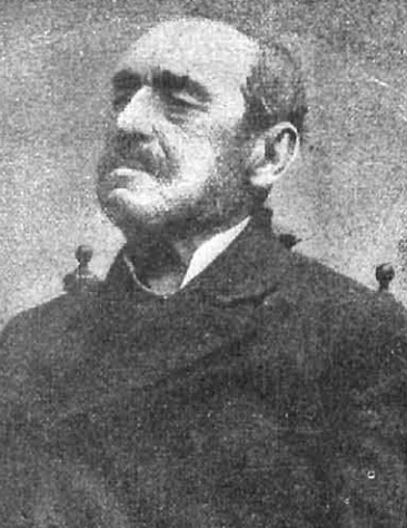 Marqués de Villamejor.